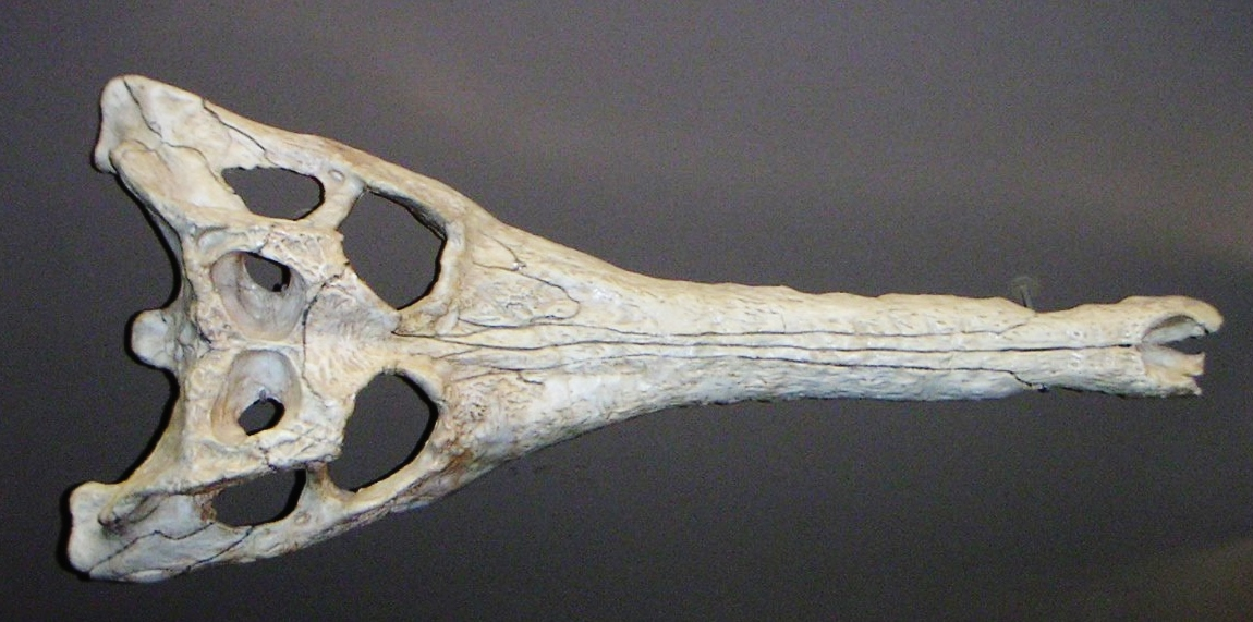 Fossil of Gavialosuchus, an extinct reptile - Museum of Natural History Wien